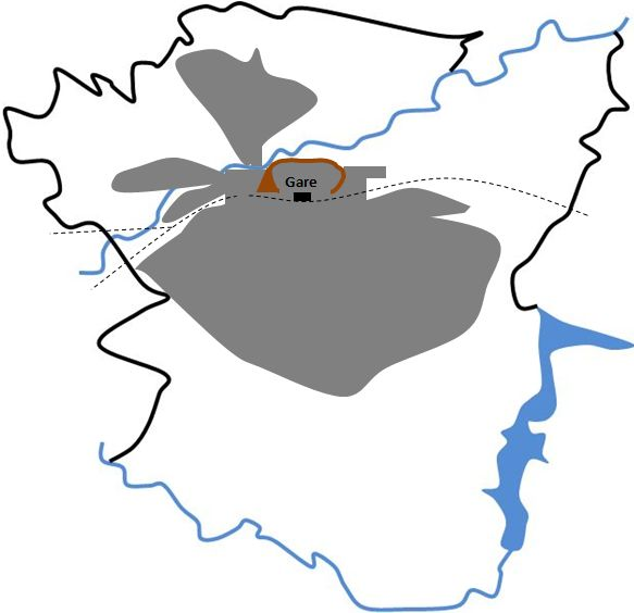 Vitré en 2010